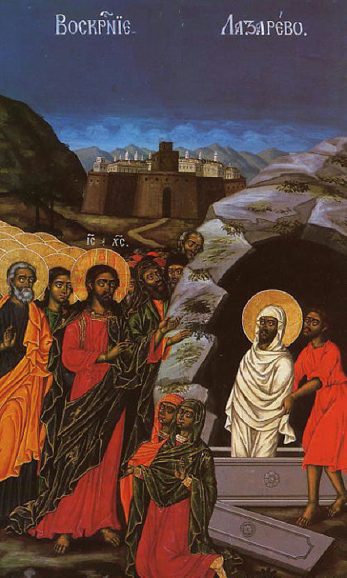 Възкресение Лазарово. Стенопис от Димитър Молеров от църквата „Свети Архангел Михаил“ в село Осеново край Банско от 1840 година.